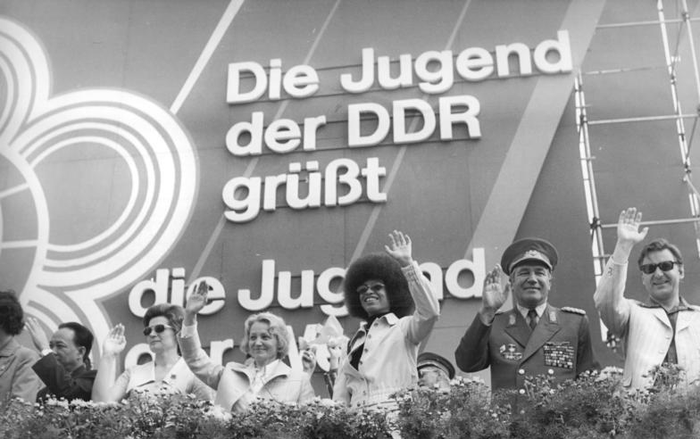 Berlin, 10. Weltfestspiel, Demonstration, Ehrentribüne ADN-ZB Demme 4.8.73 Berlin:Festival-Demonstration-Vor den Augen der Weltjugend und der Repräsentanten von Partei-und Staatsführung der DDR legte die junge Generation der DDR am 4.8.73 ein machtvolles Bekenntnis zu ihrem sozialistischen Vaterland ab.Auf der Ehrentribüne hatten u.a. Platz genommen:Siegfried Lorenz, Armeegeneral Heinz Hoffmann, Angela Davis, Minister Margot Honecker, Walentina Tereschkowa und der Leiter der Delegaton der DRV, Vu Quang (v.l.n.r) (Titel und Funktionen siehe ADN-Meldung!)